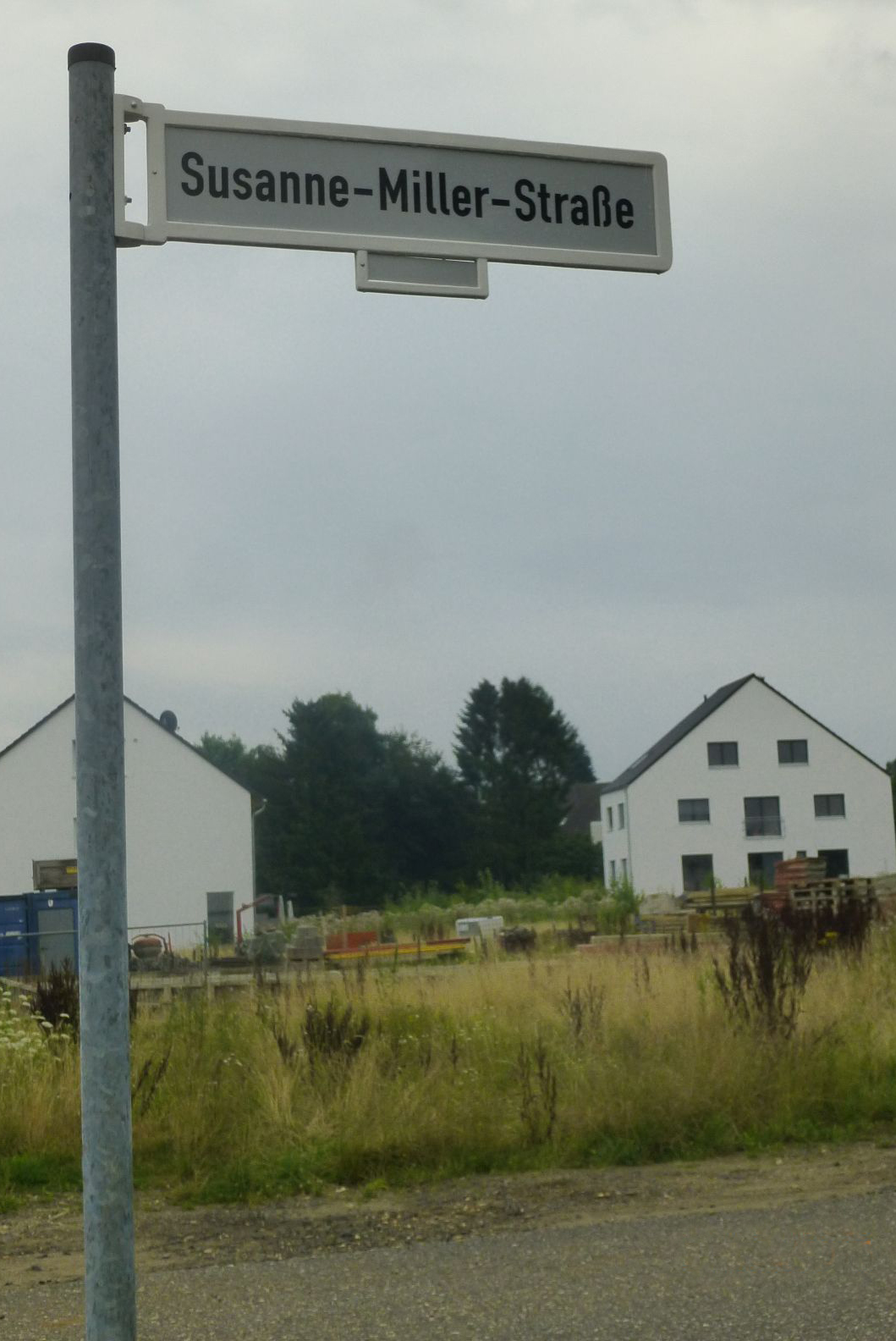 Schild der Straße "Susanne-Miller-Straße" in Bonn-Rottgen